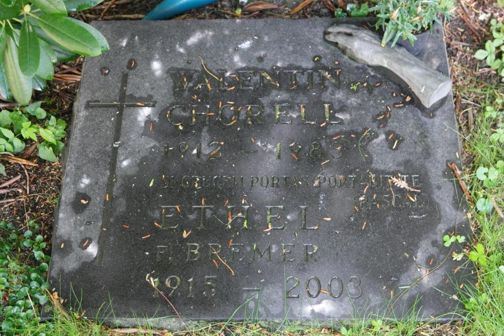 Grab des Schriftstellers und Drehbuchautoren Walentin Chorell (1912-1983) auf dem Friedhof Hietaniemi in Helsinki